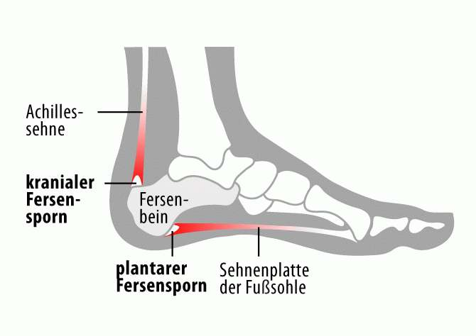 Die Anatomie eines Fußes zur Darstellung der unterschiedlichen Formen des Fersensporns